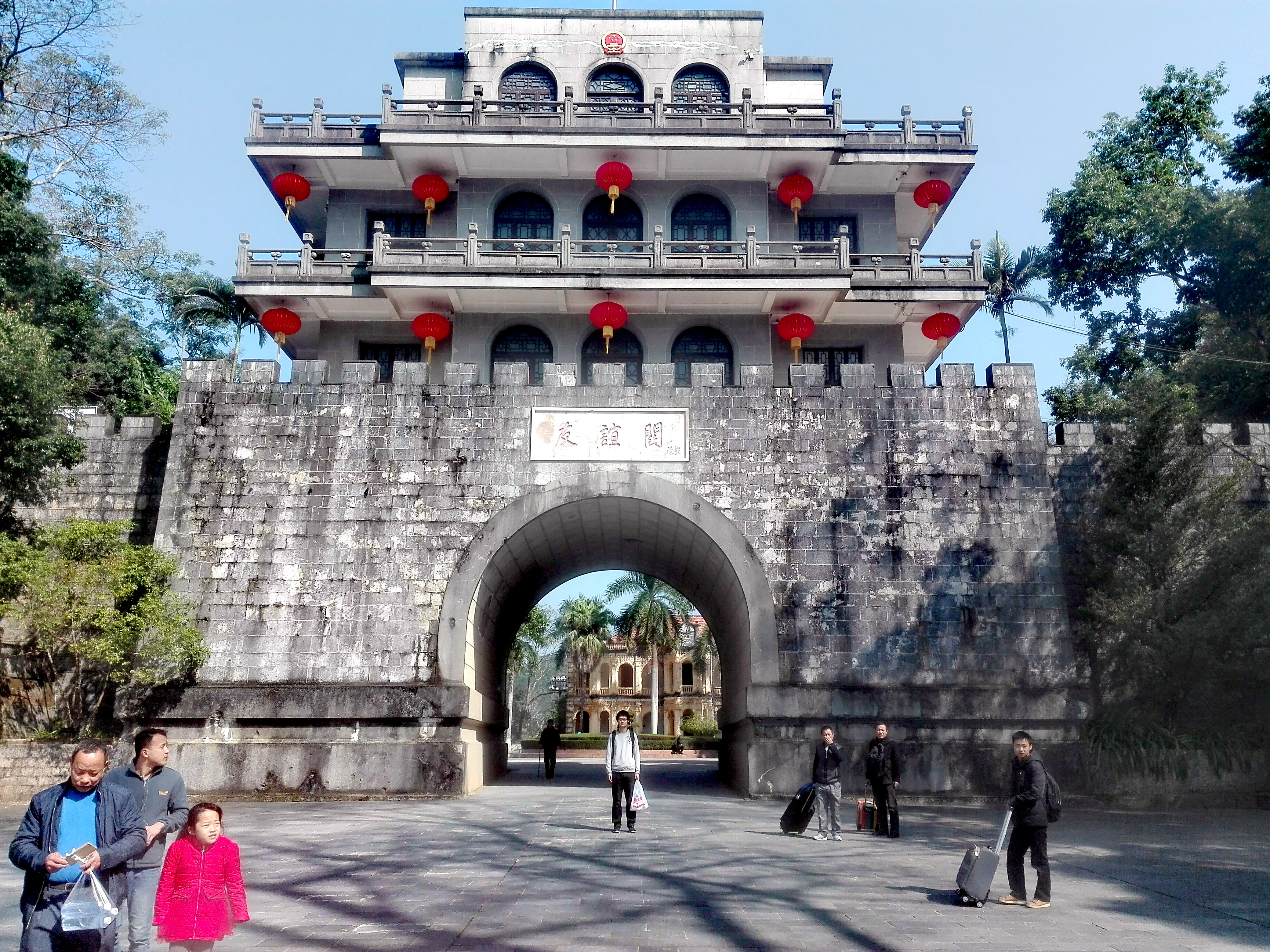 友谊关口岸中方国门